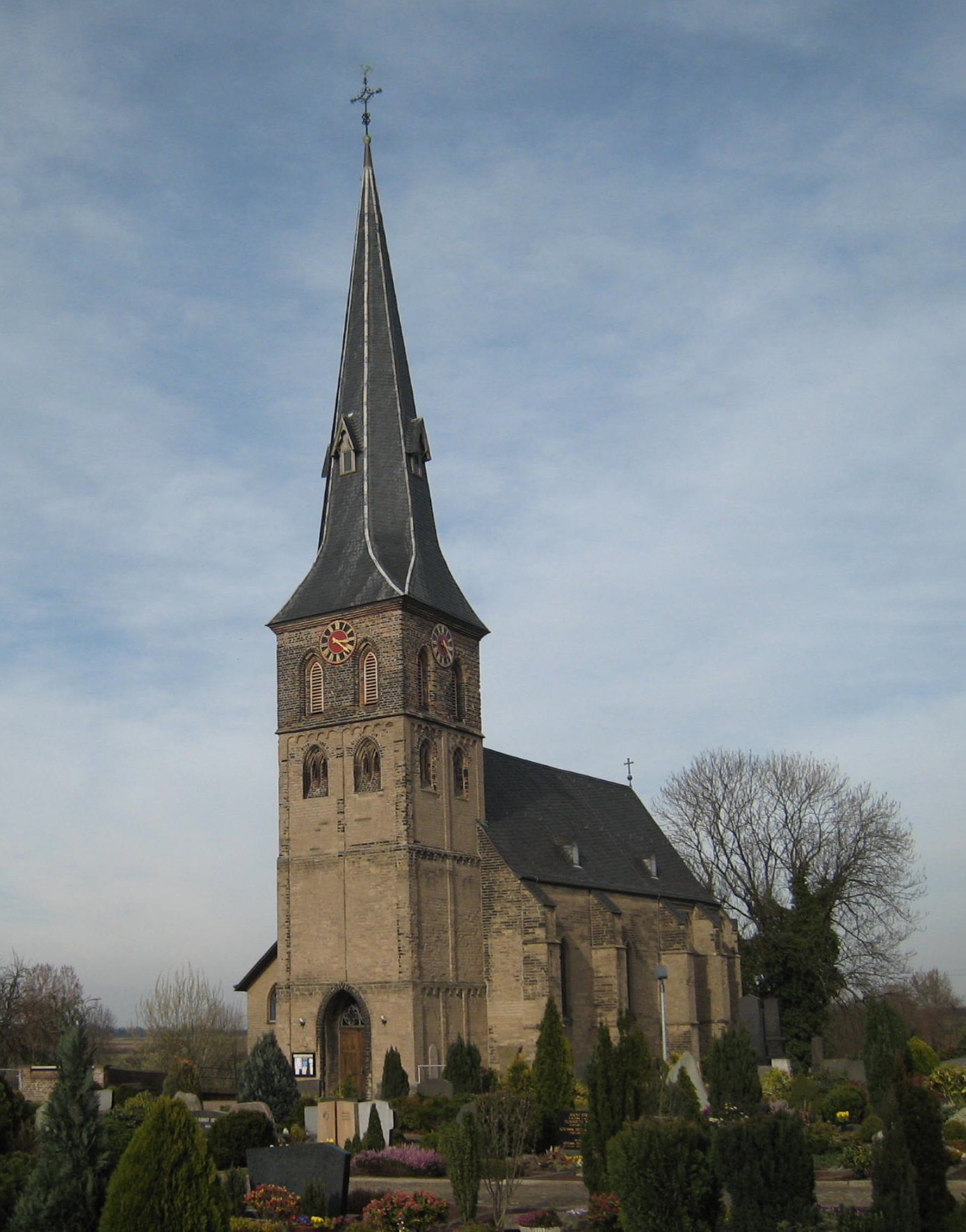 Evangelische Dorfkirche Duisburg Baerl